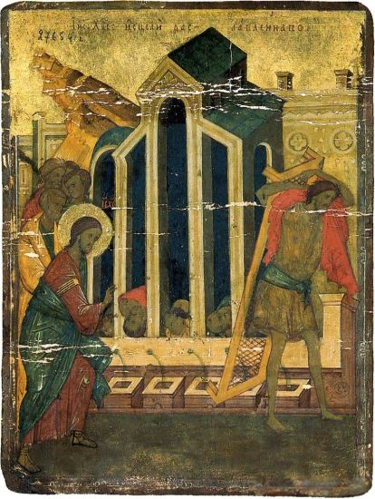 Россия, Вторая четверть XV века. Холст, левкас, темпера. 23 × 18 см Сергиево-Посадский государственный историко-художественный музей-заповедник